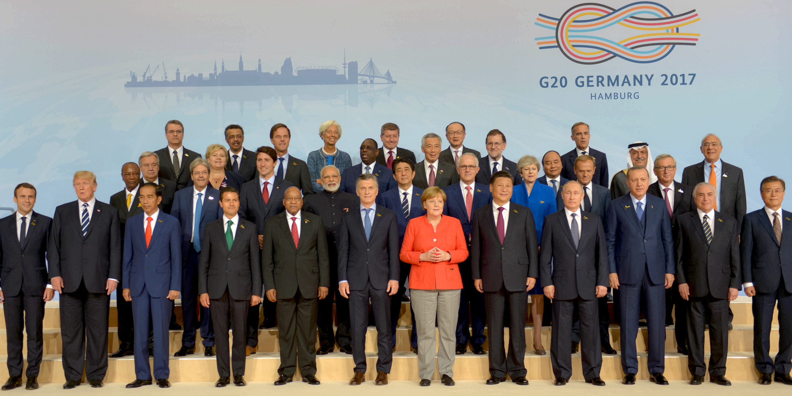 Cumbre de Líderes del G20